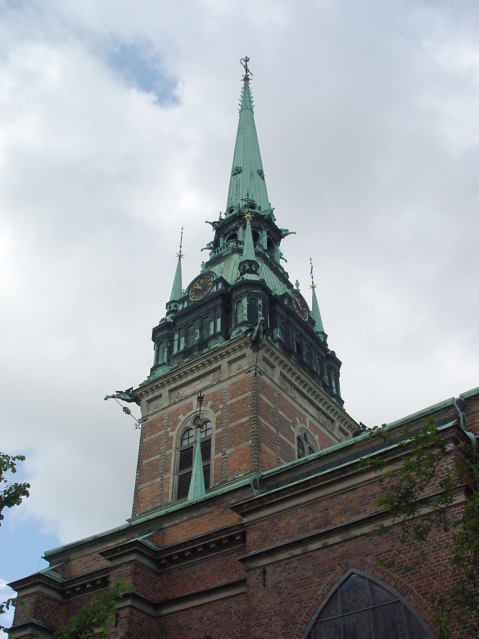 Turm der deutschen Kirche in Stockholm (Tyska Kyrkan)